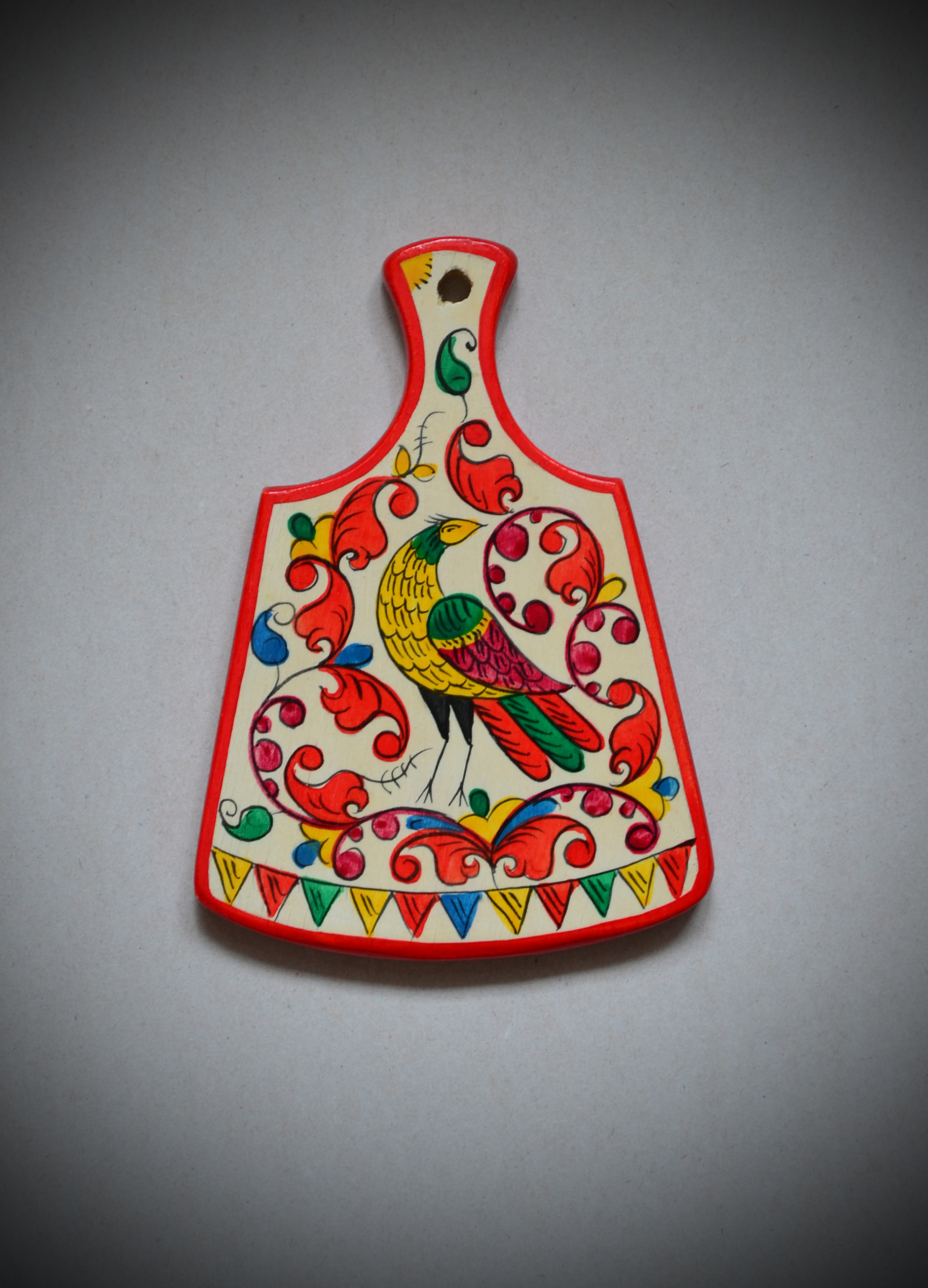 Борецкая роспись по дереву.Россия,Архангельская область.